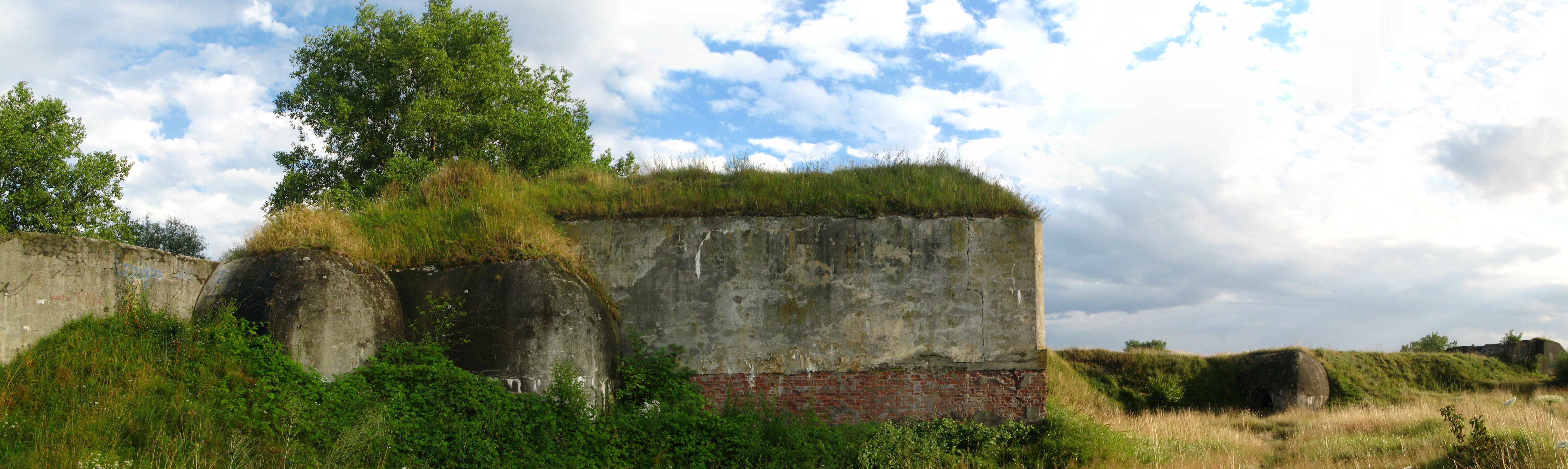 Kobylany - Fort Koroszczyn, 1910 (zabytek nr rejestr. A-203 z 17.08.1992)